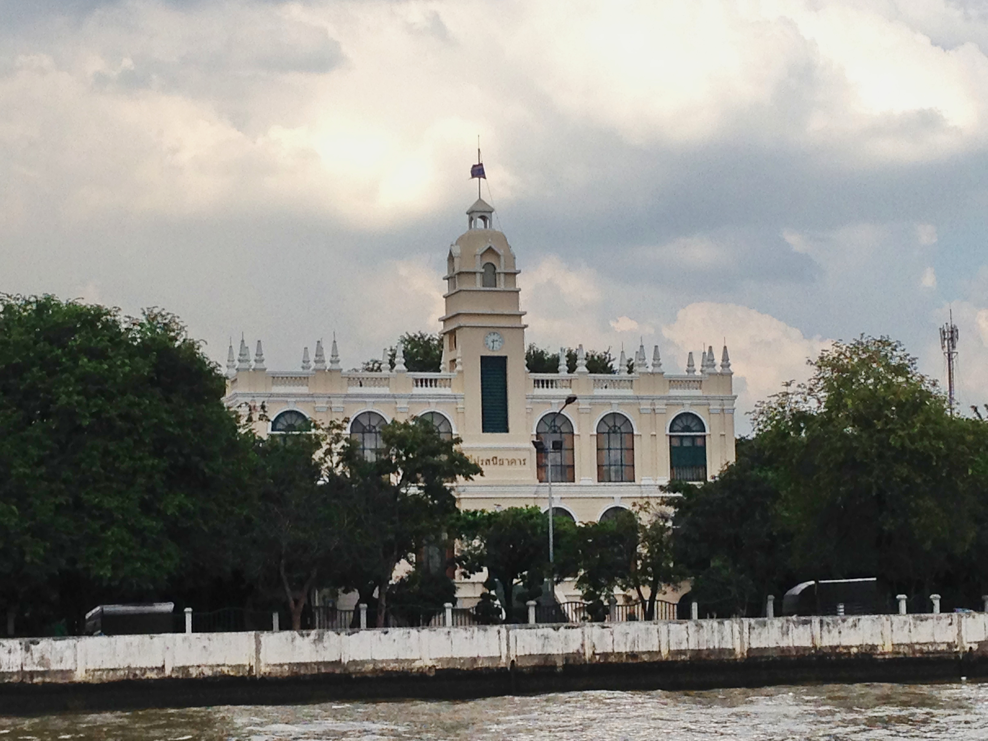 Wang Burapha Phirom, Phra nakhon, bangkok